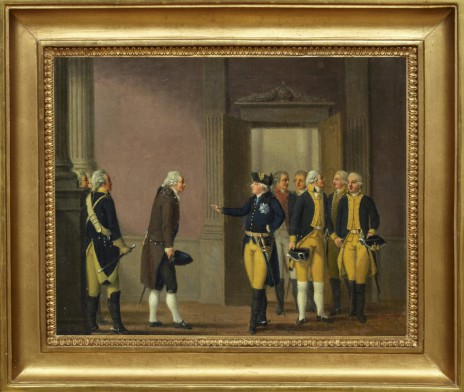 Gustaf III innan revolutionen började 1772.title QS:P1476,sv:"Gustaf III innan revolutionen började 1772." label QS:Lsv,"Gustaf III innan revolutionen började 1772."